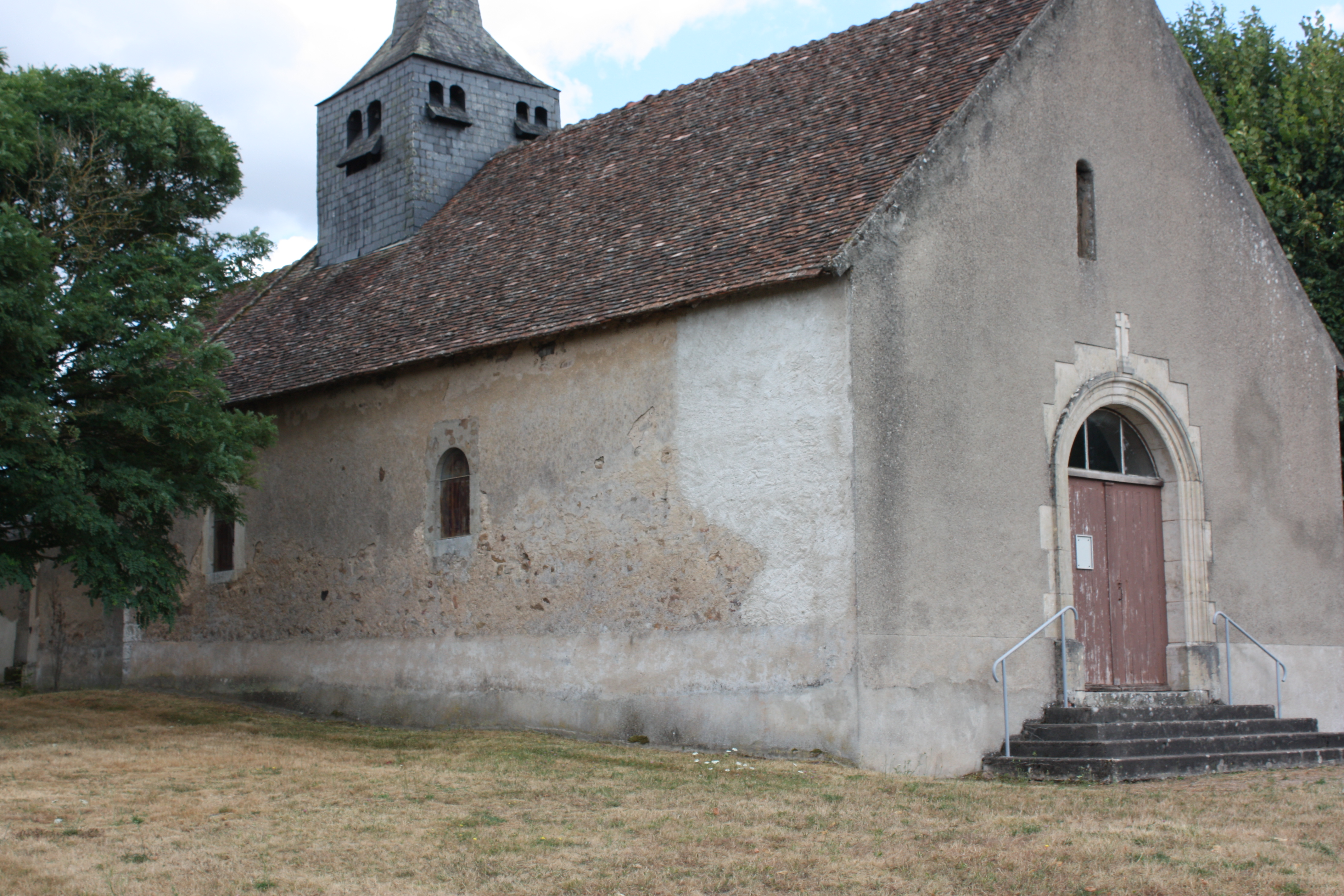 Mouron-sur-Yonne - Eglise Notre-Dame